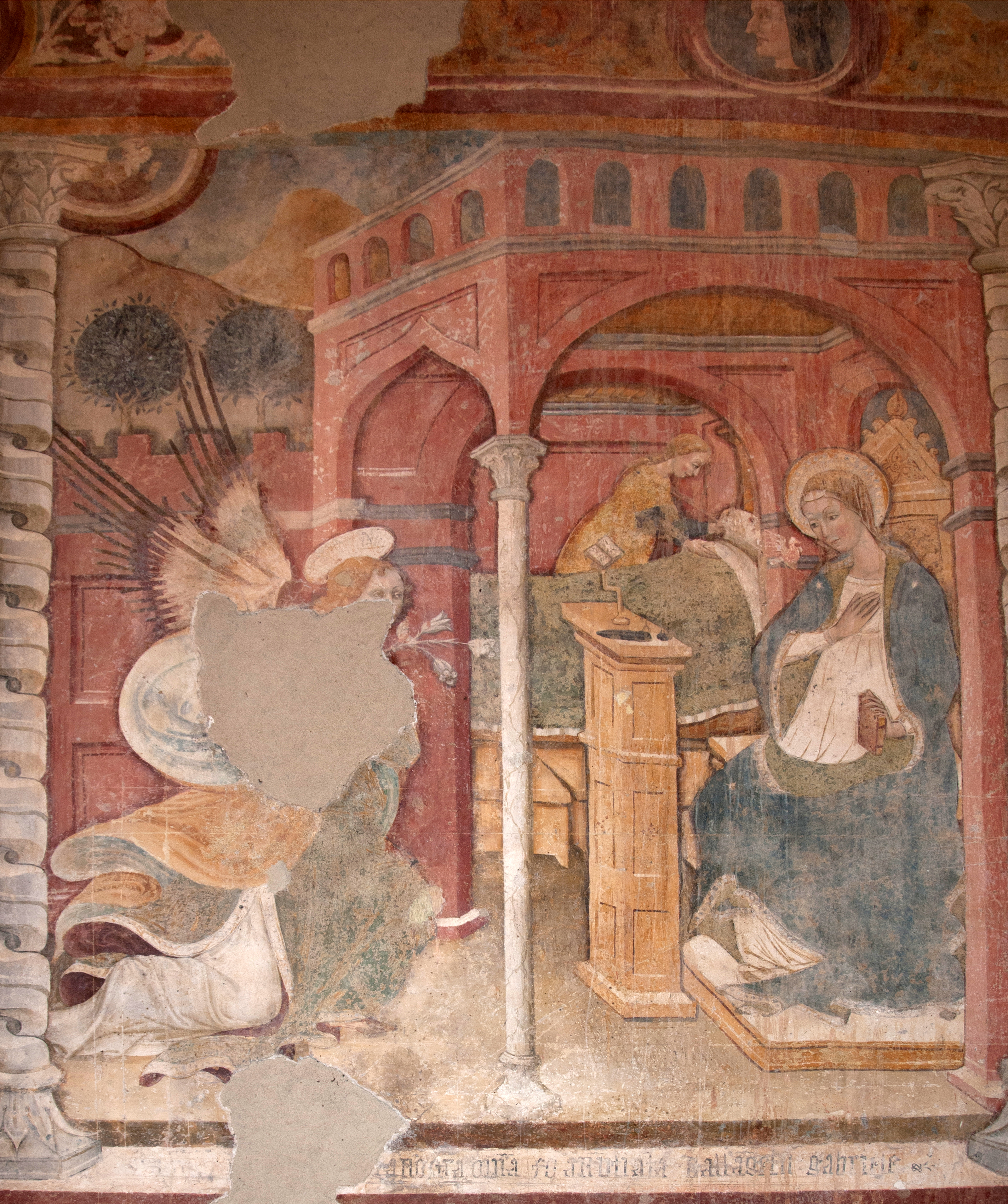 Chiesa della Madonna Bianca - Ancarano